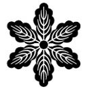 六つ葉柏（むつばかしわ）